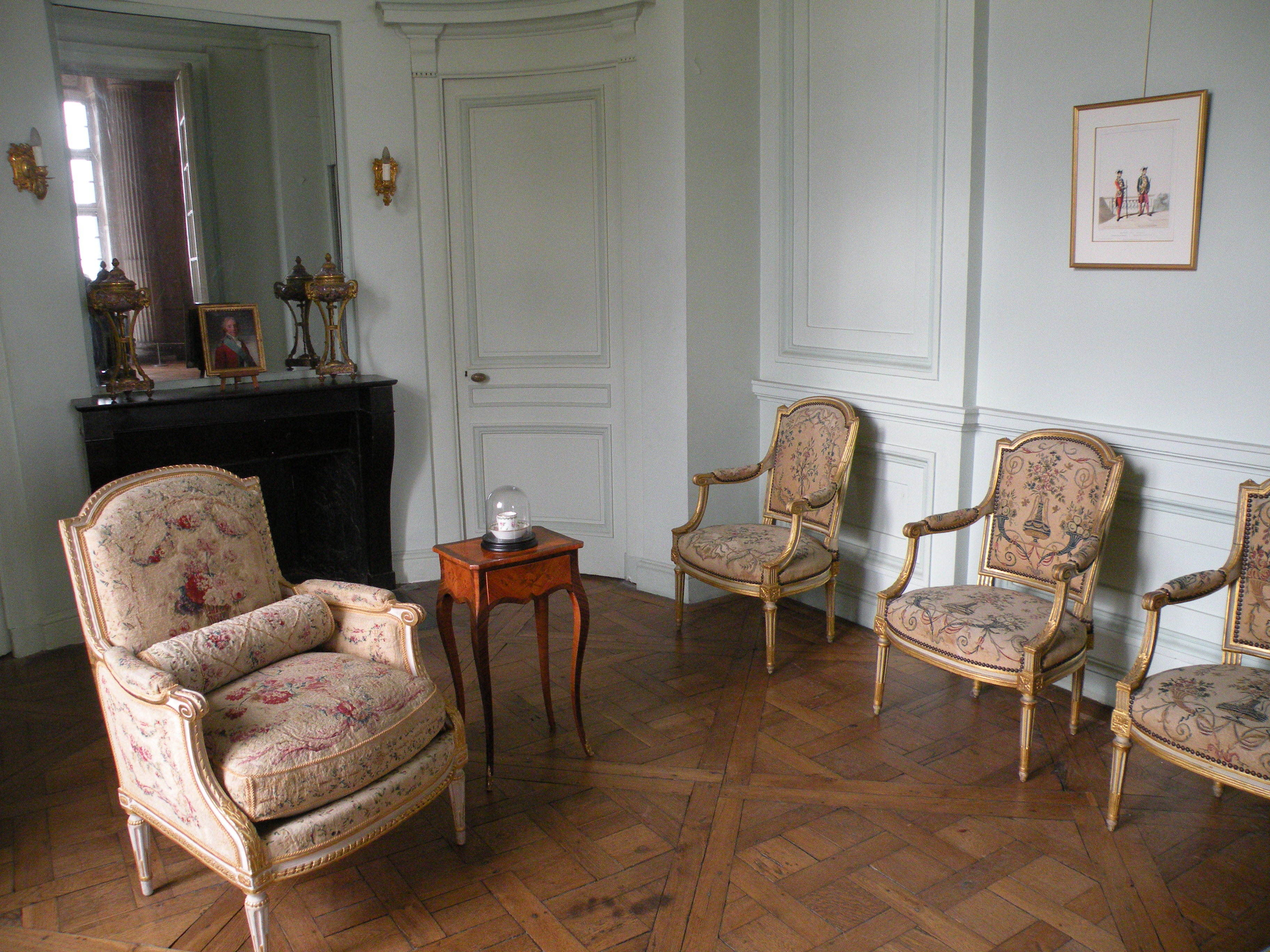 Château de Maisons-Laffitte - Boudoir du Comte d'Artois